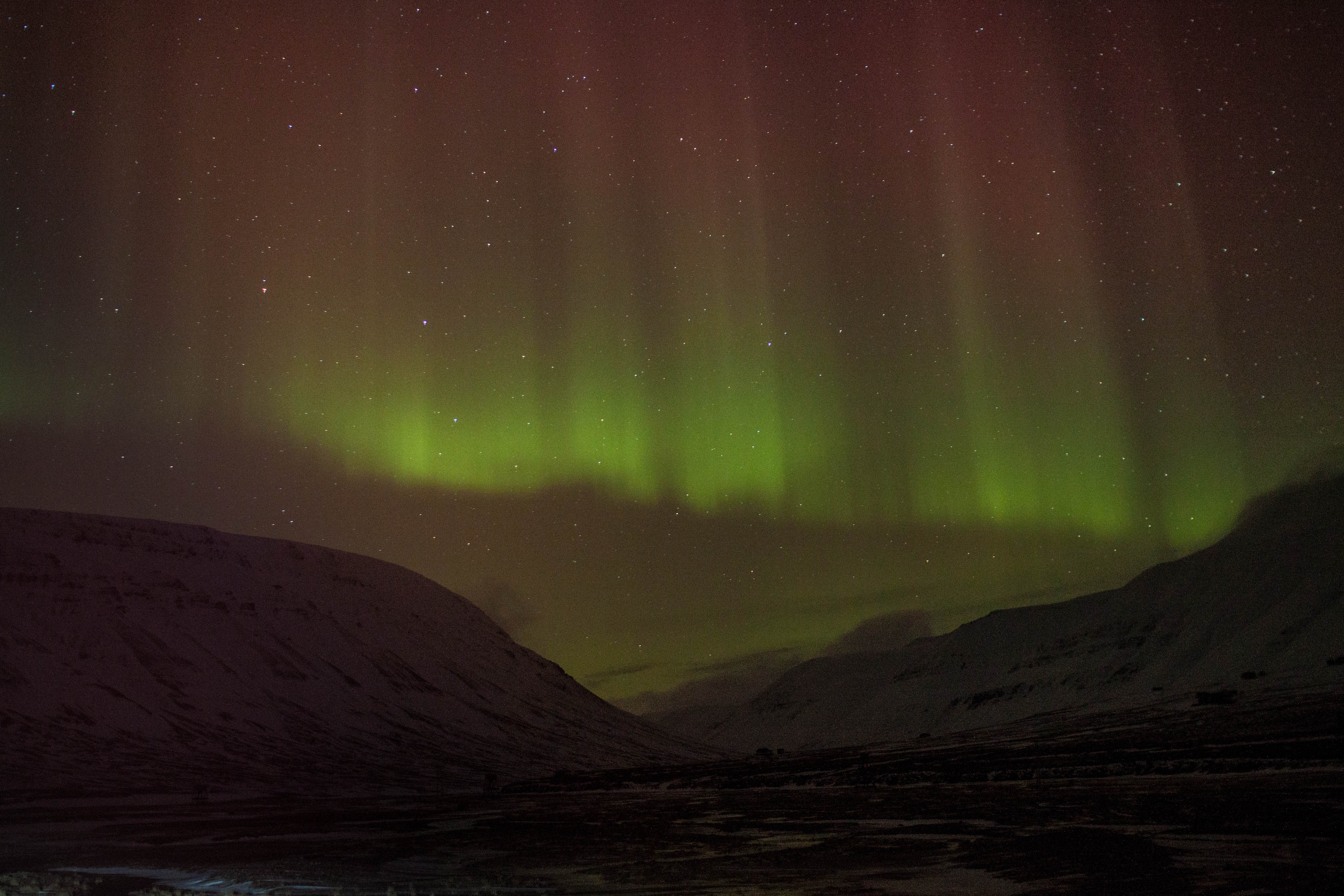 Aurora over Svalbard